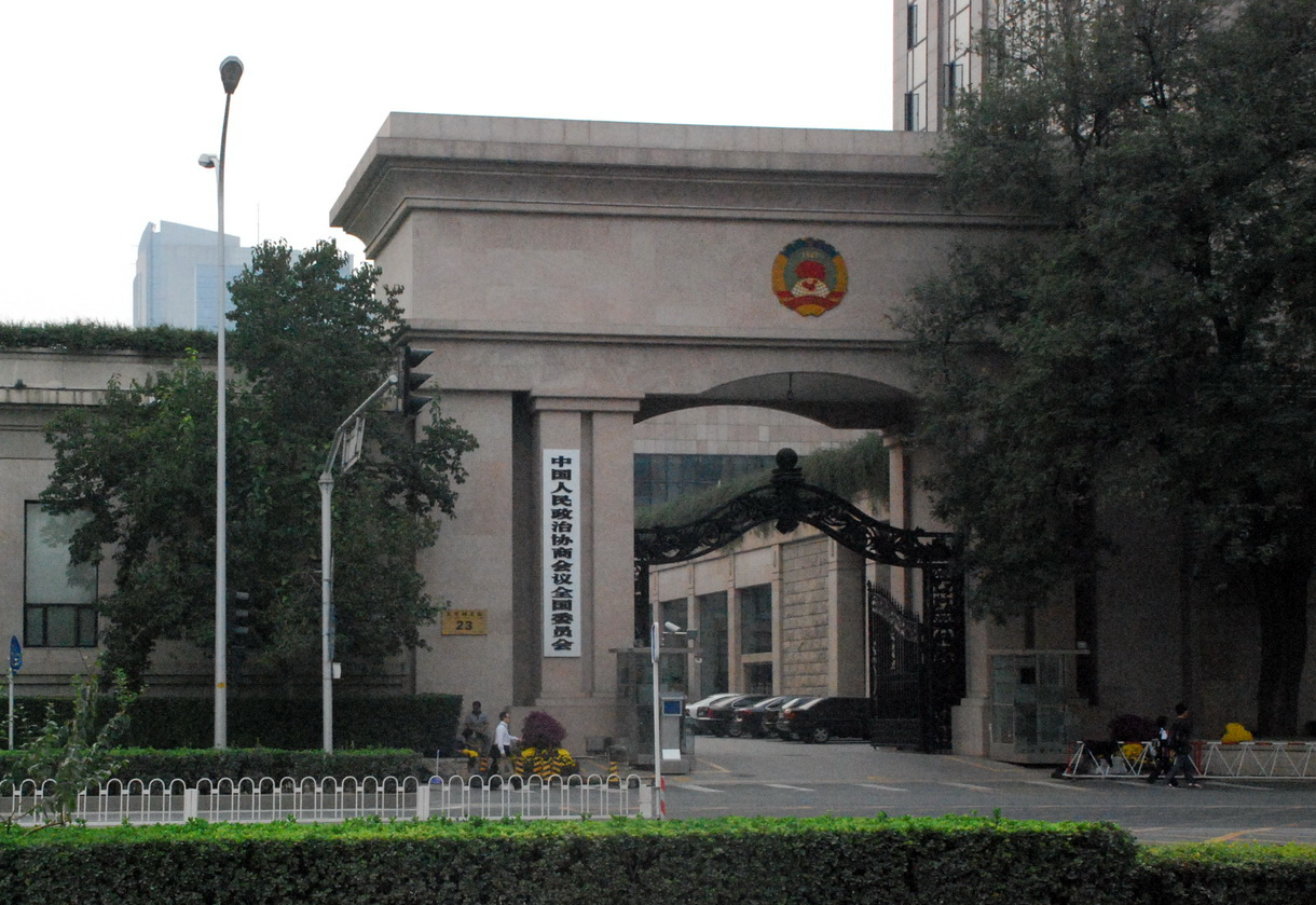 全国政协大门